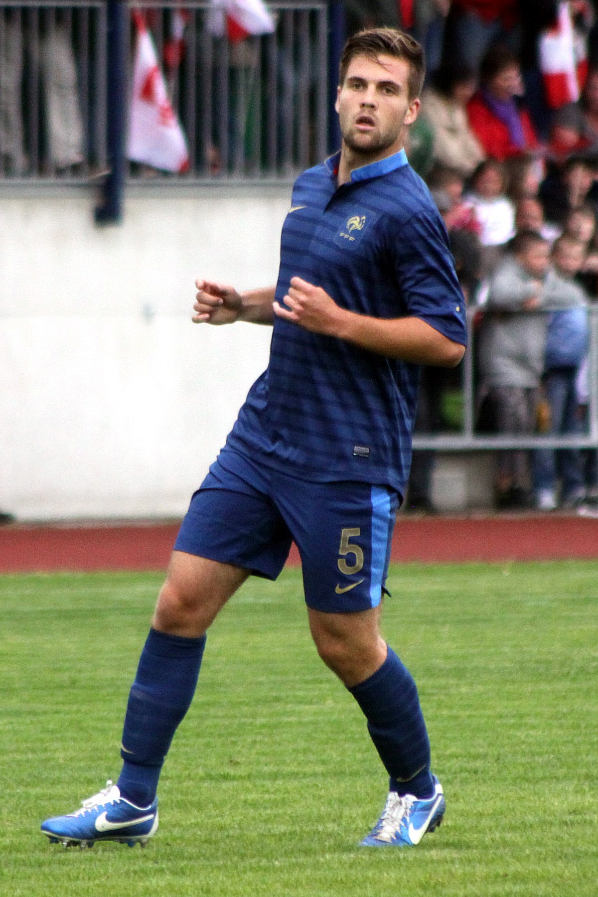 Qualifikationsspiel zur U-19 Fußball-Europameisterschaft: Österreich] gegen Frankreich am 10. Juni 2013 (0:1)] in Traiskirchen. - Das Foto zeigt Lucas Rougeaux (OGC Nice). en Qualification for the 2013 UEFA European Under-19 Football Championship qualification Austria vs. France (0:1) on 2013-2013-06-10 in Traiskirchen. – The photo shows Lucas Rougeaux (OGC Nice).